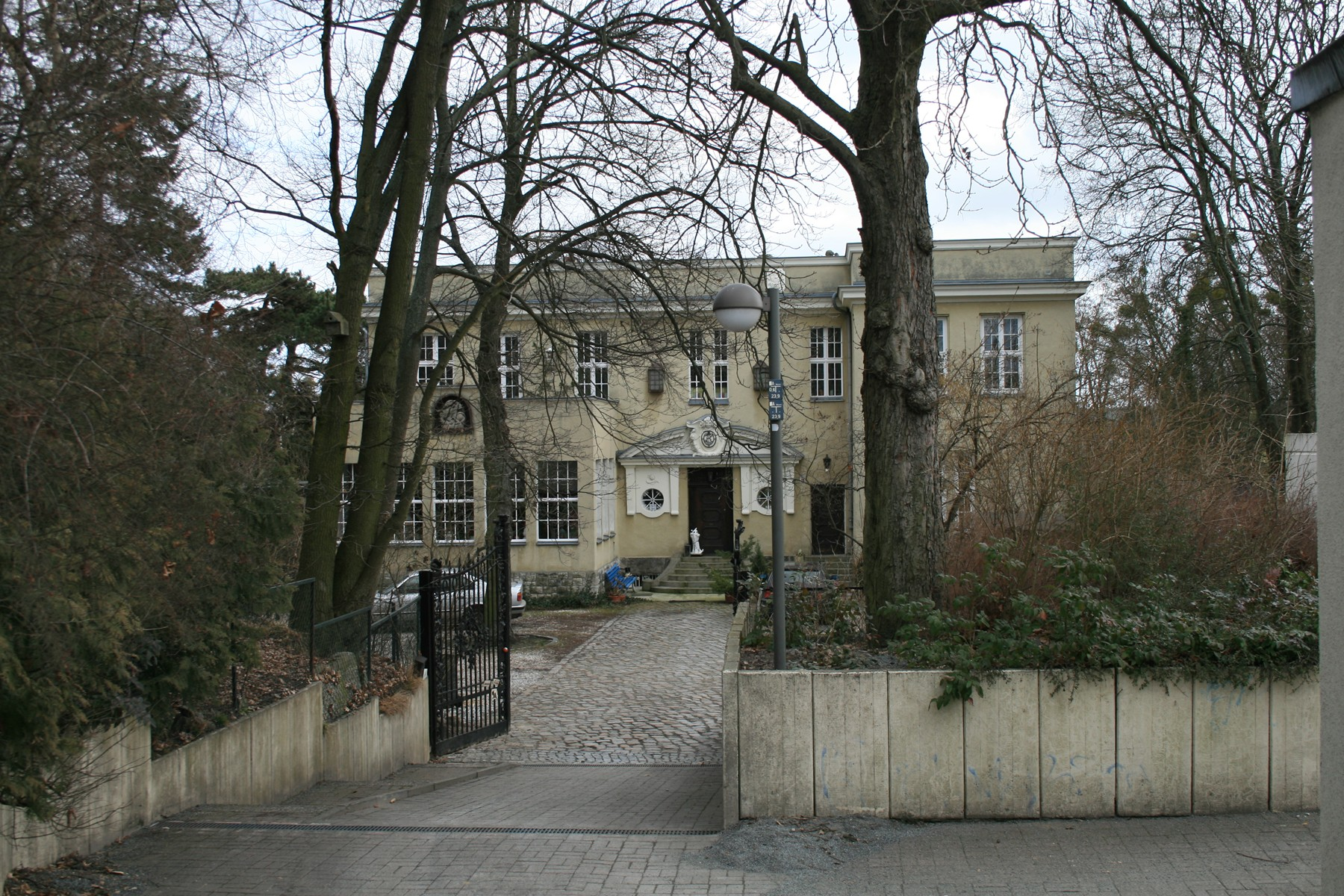 Berlin-Kladow, Setheweg 9A. Villa Pietsch-Kutschera.